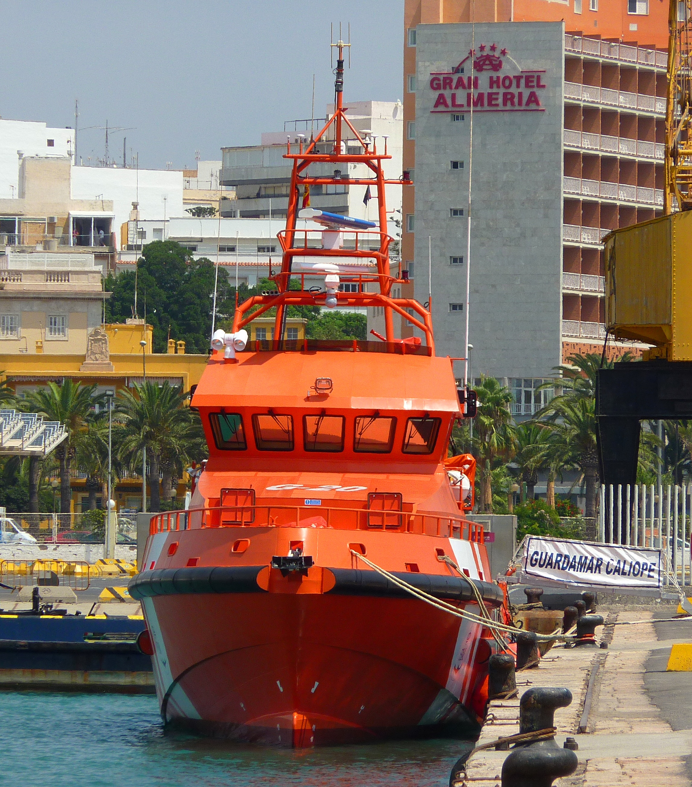 Embarcación de Intervención Rápida clase Guardamar "Guardamar Calíope" (G-40) de la Sociedad de Salvamento y Seguridad Marítima.